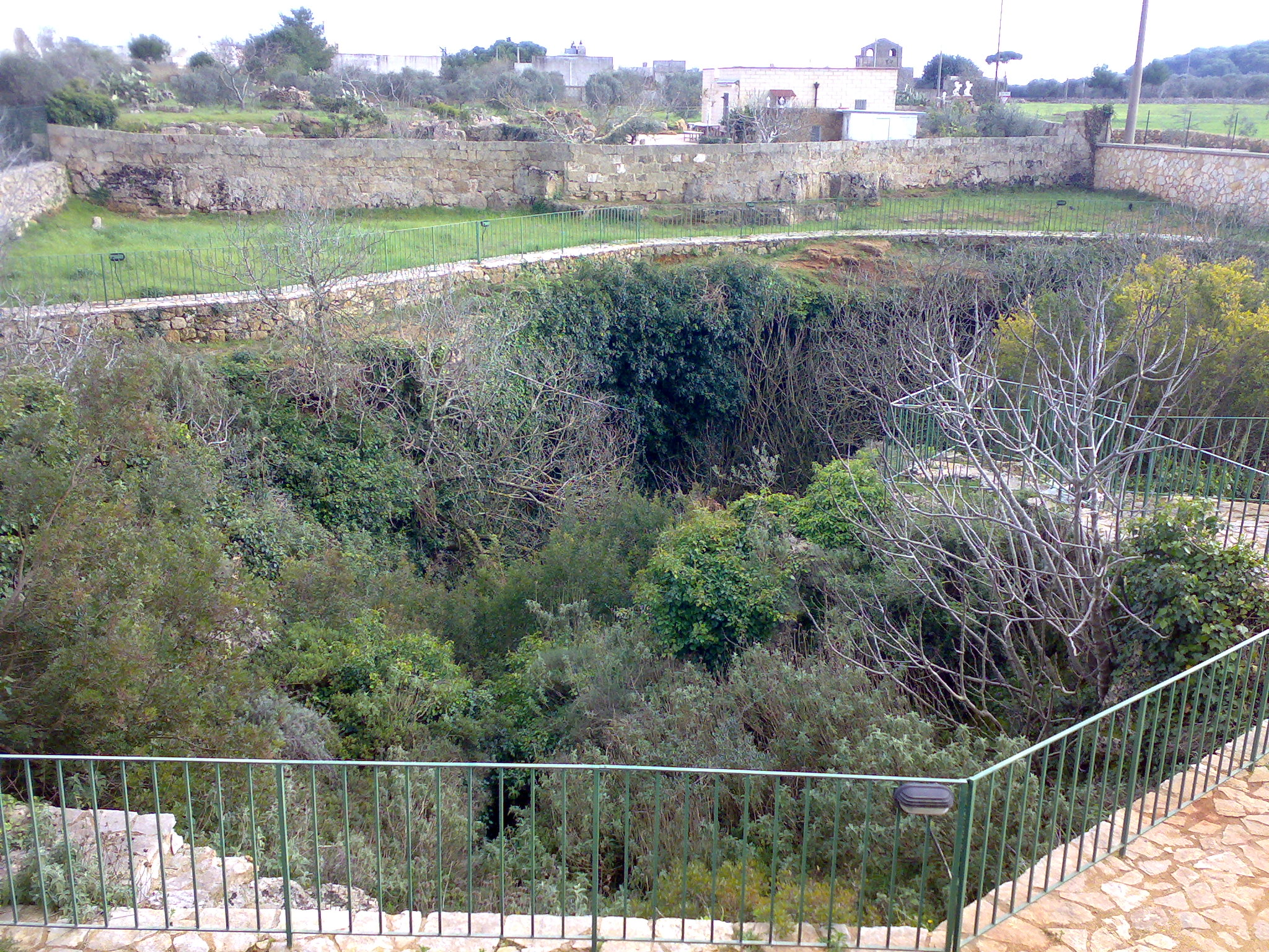 Vora di Barbarano del Capo